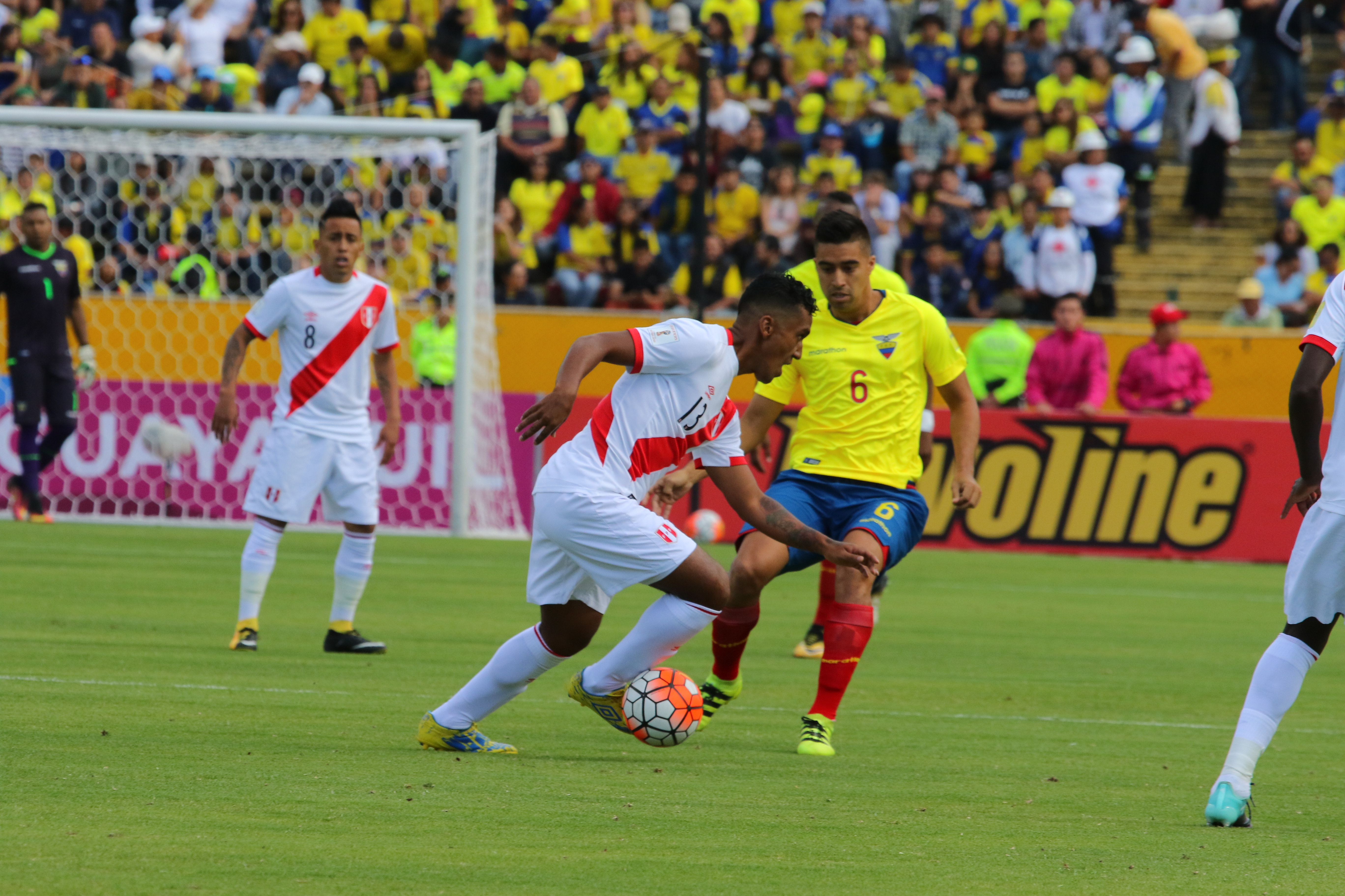 Quito 5 Sep (Andes).- Encuentro por eliminatorias Rusia 2018 entre Ecuador y Perú. Fotografías: Carlos Rodríguez/Andes.